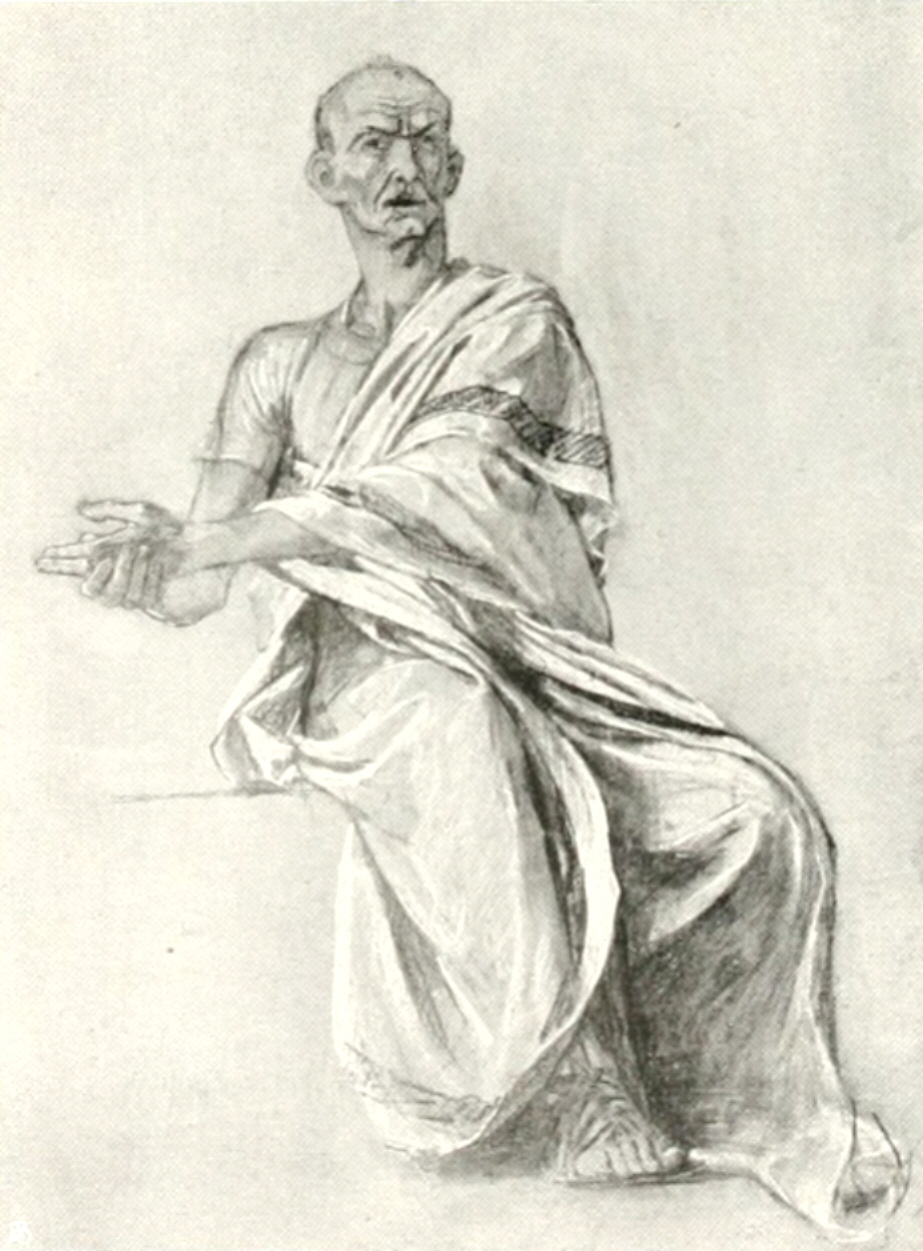 Pilatus, Studie zur 1. Kreuzwegstation